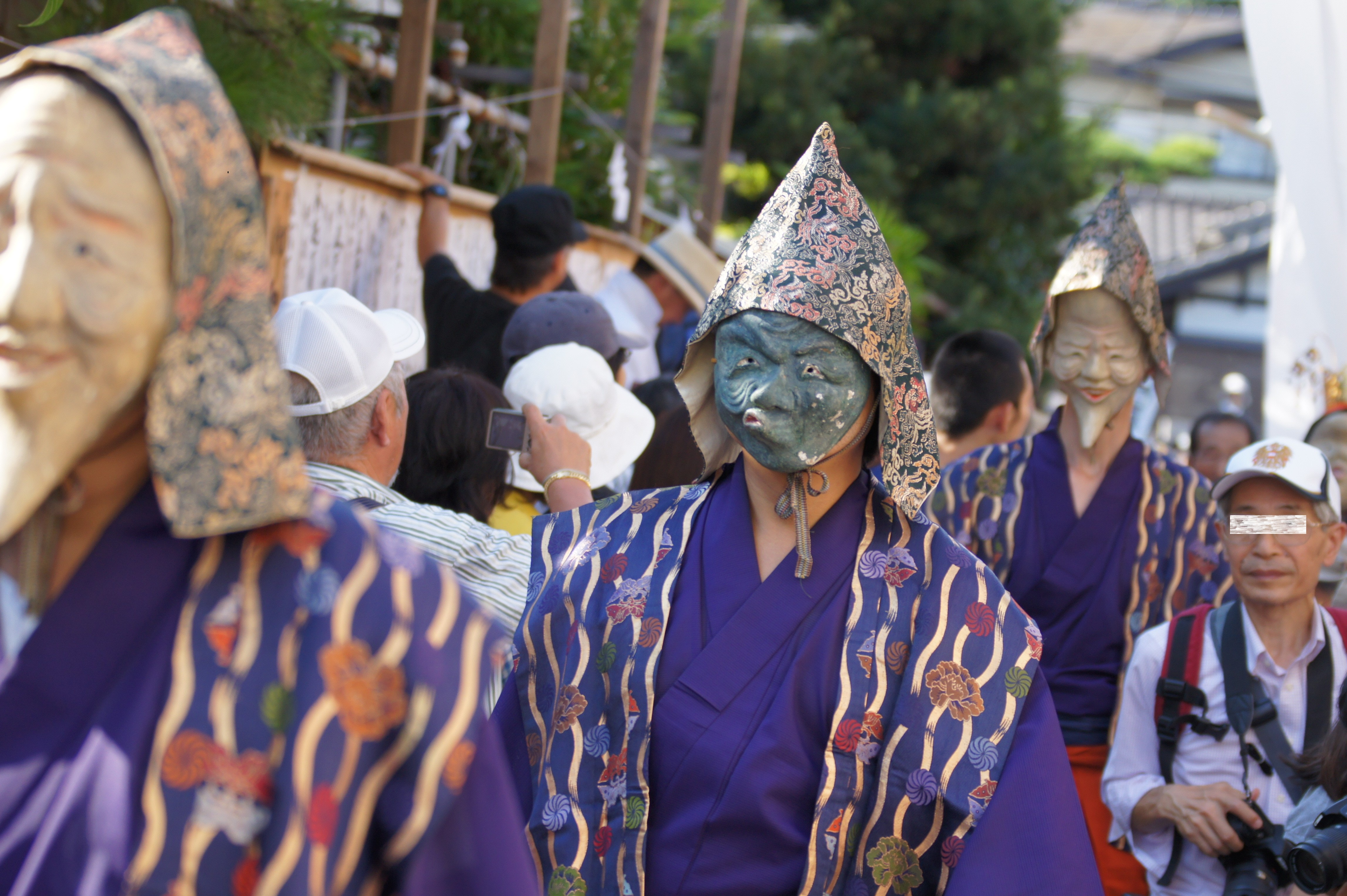 御霊神社 (鎌倉市)で行われるja:面掛行列の写真。（2010/09/18撮影）